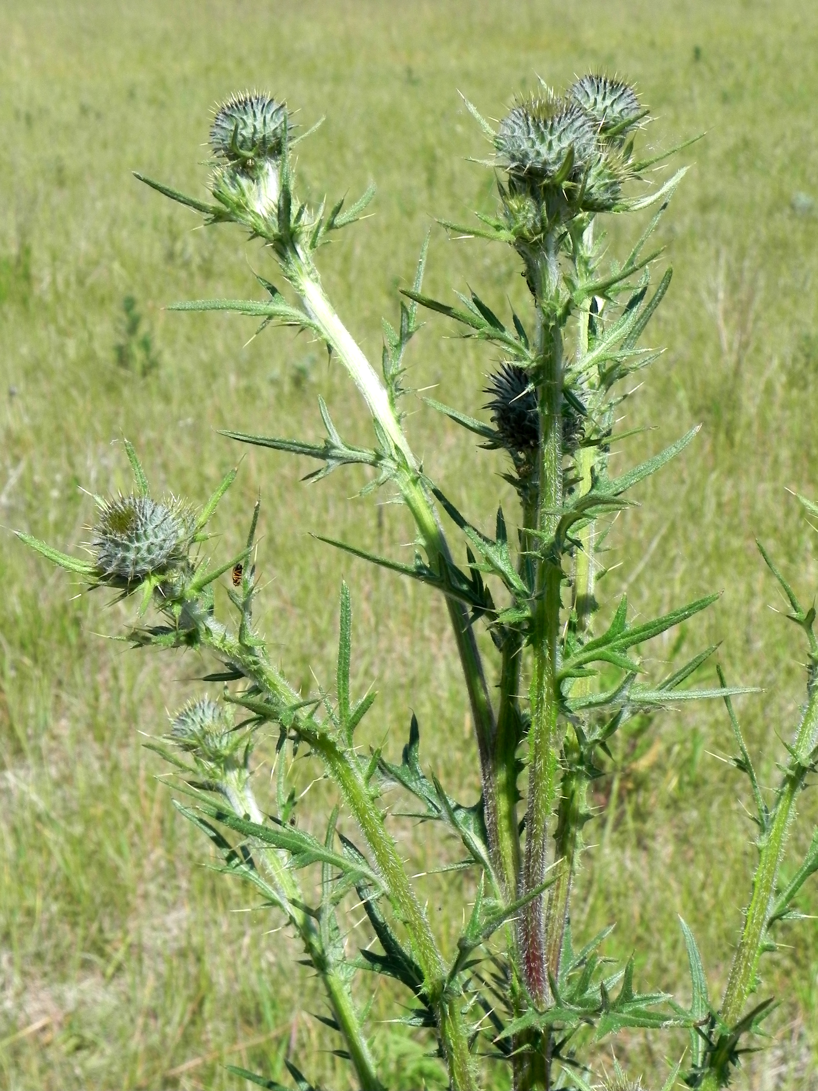 Lanzett-Kratzdistel (Cirsium vulgare), Standort Naturpark Südheide, Niedersachsen, Germany